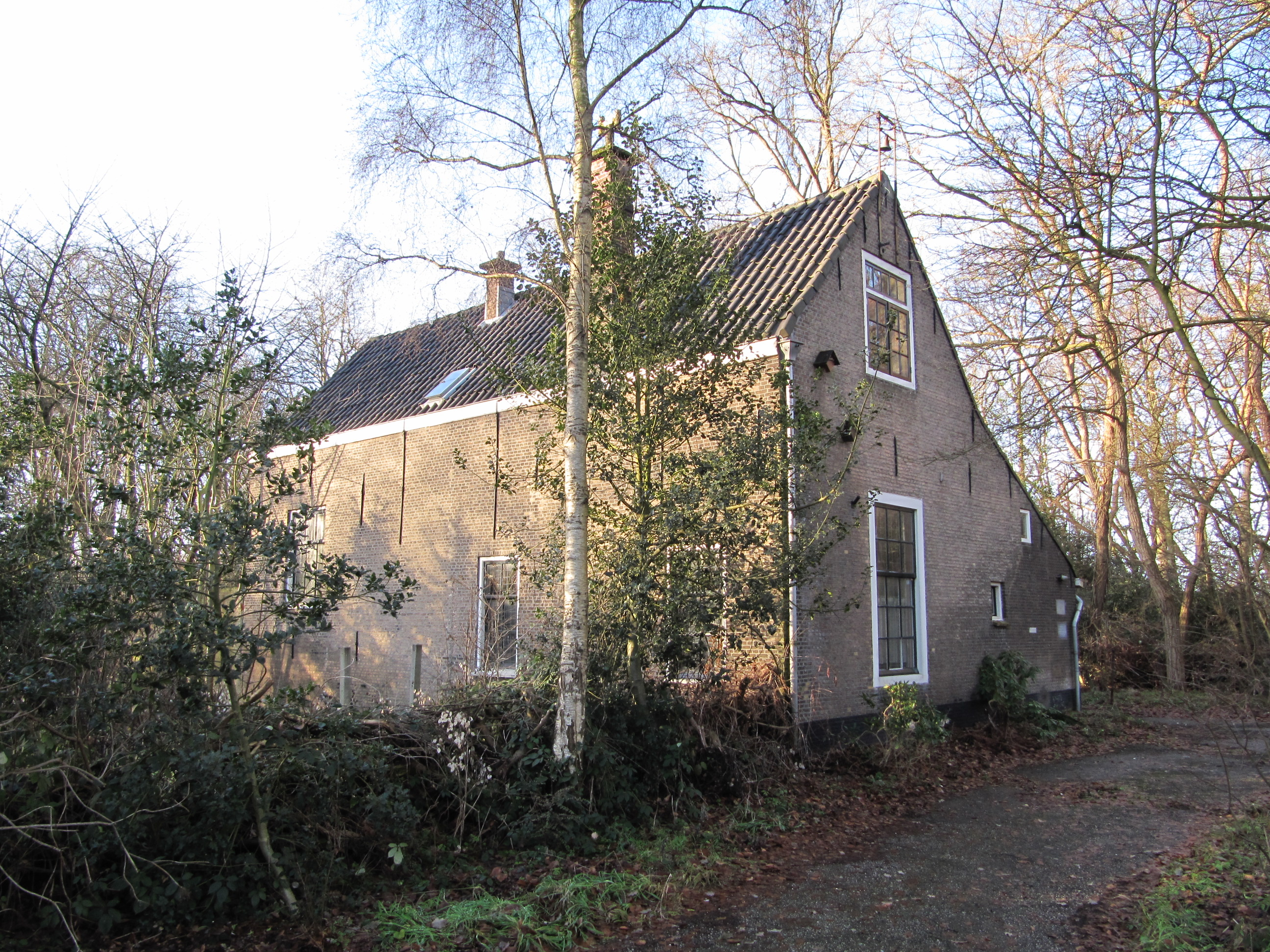 RM20082 Rijswijk - Van Vredenburchweg 985-987 (portierswoning foto 1).jpg